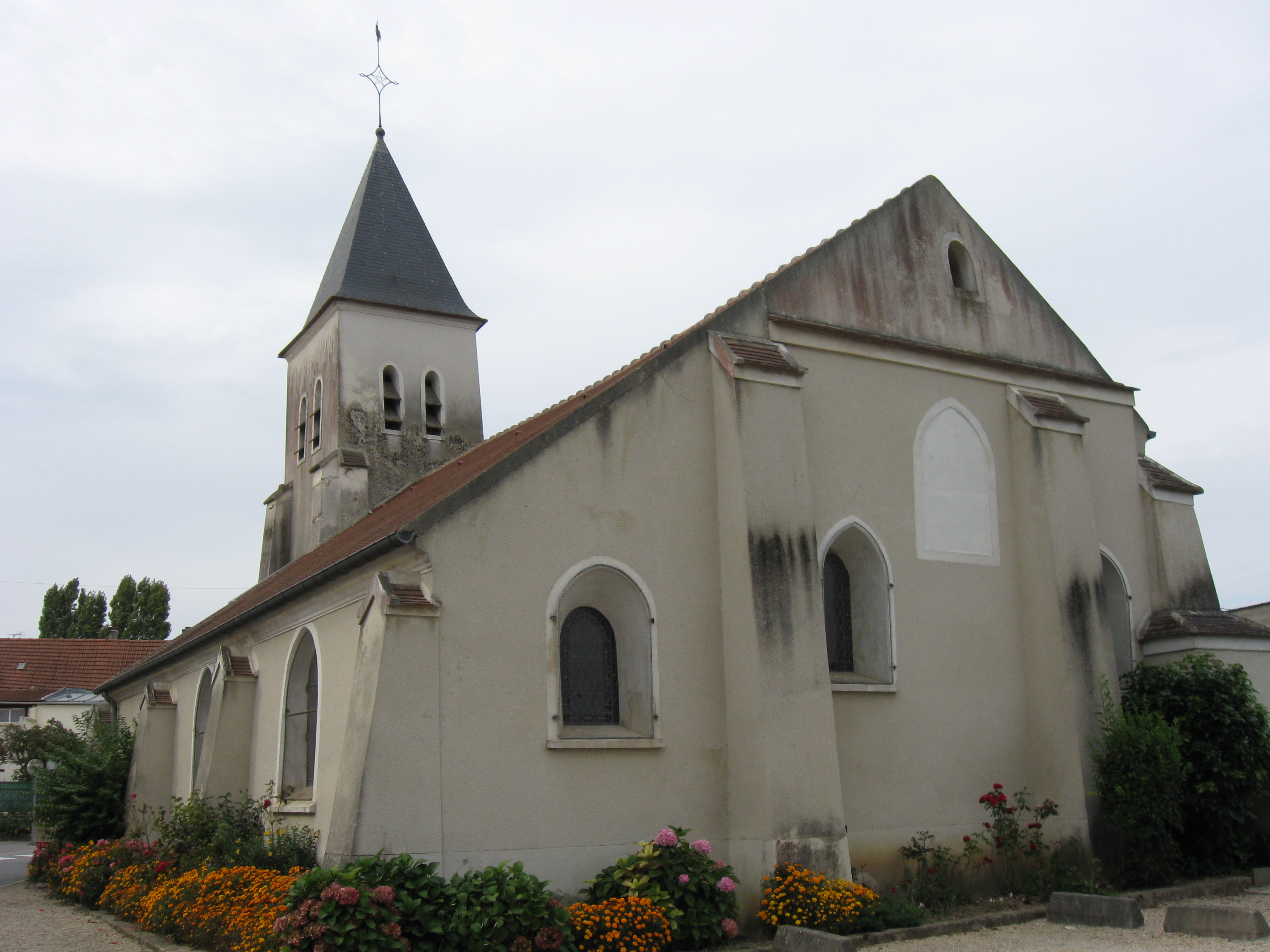 Église de la Nativité-de-Notre-Dame de Le Plessis-l'Évêque. (Seine-et-Marne, région Île-de-France).